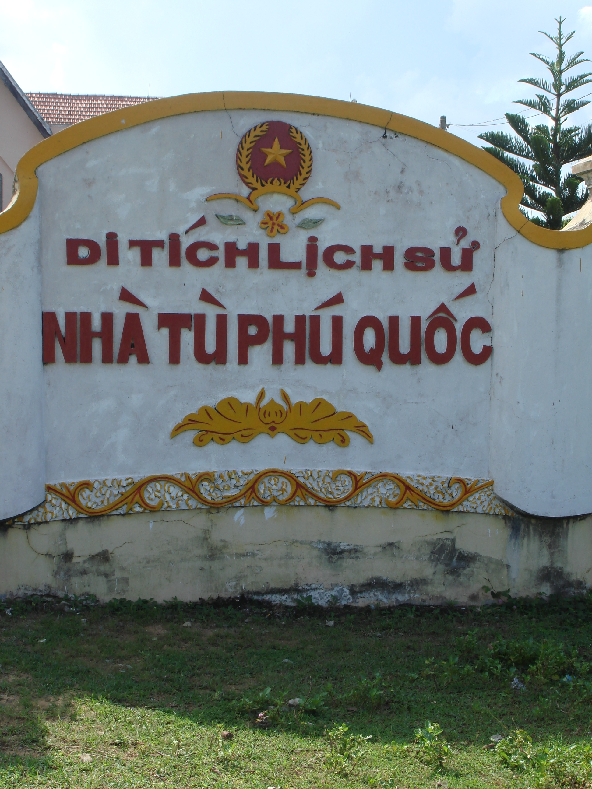 Nhà tù Phú Quốc